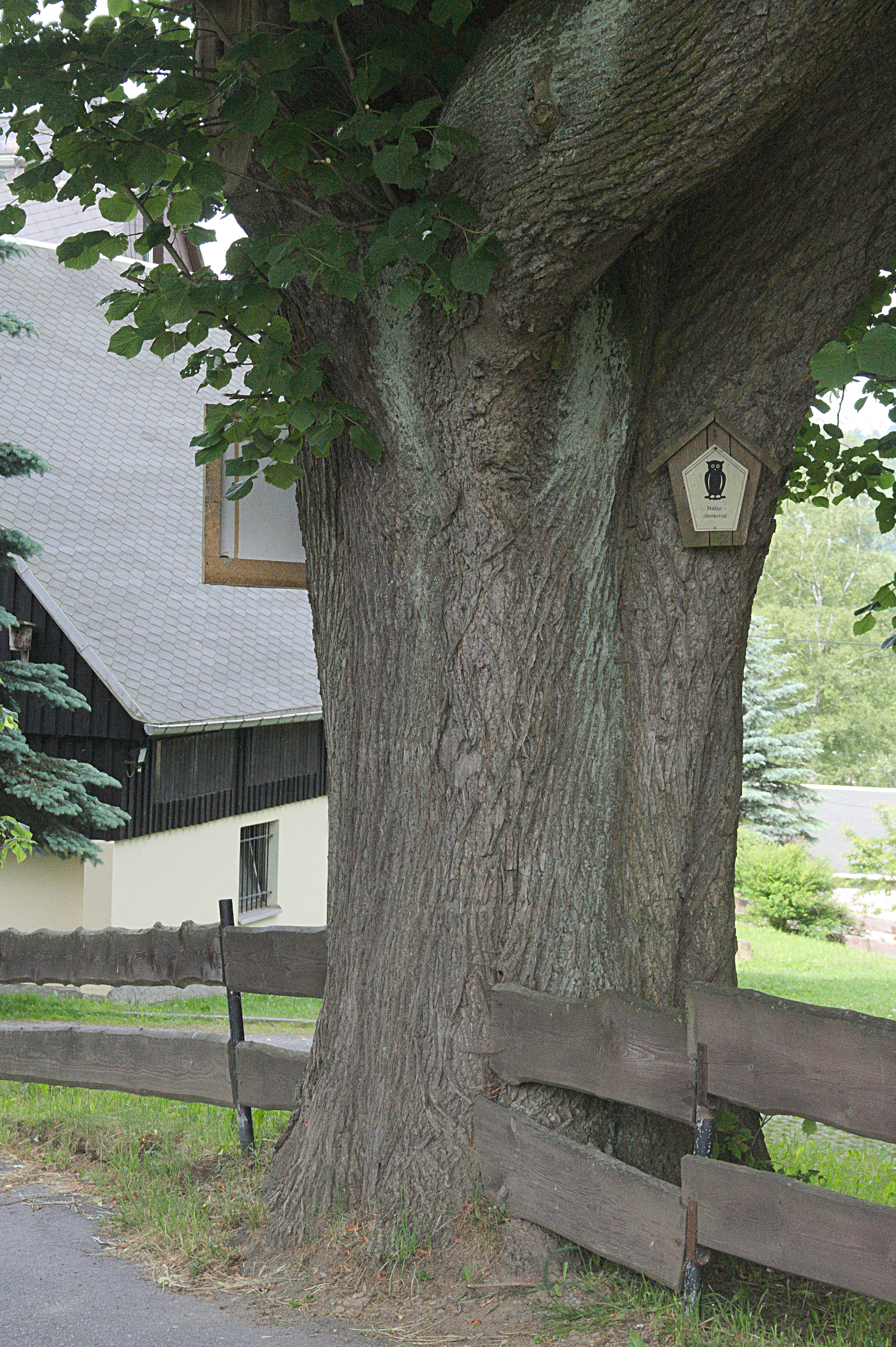 Naturdenkmal Linde (Tilia sp.) in Dörfel (Ortsteil von Schlettau, Erzgebirgskreis, Sachsen)